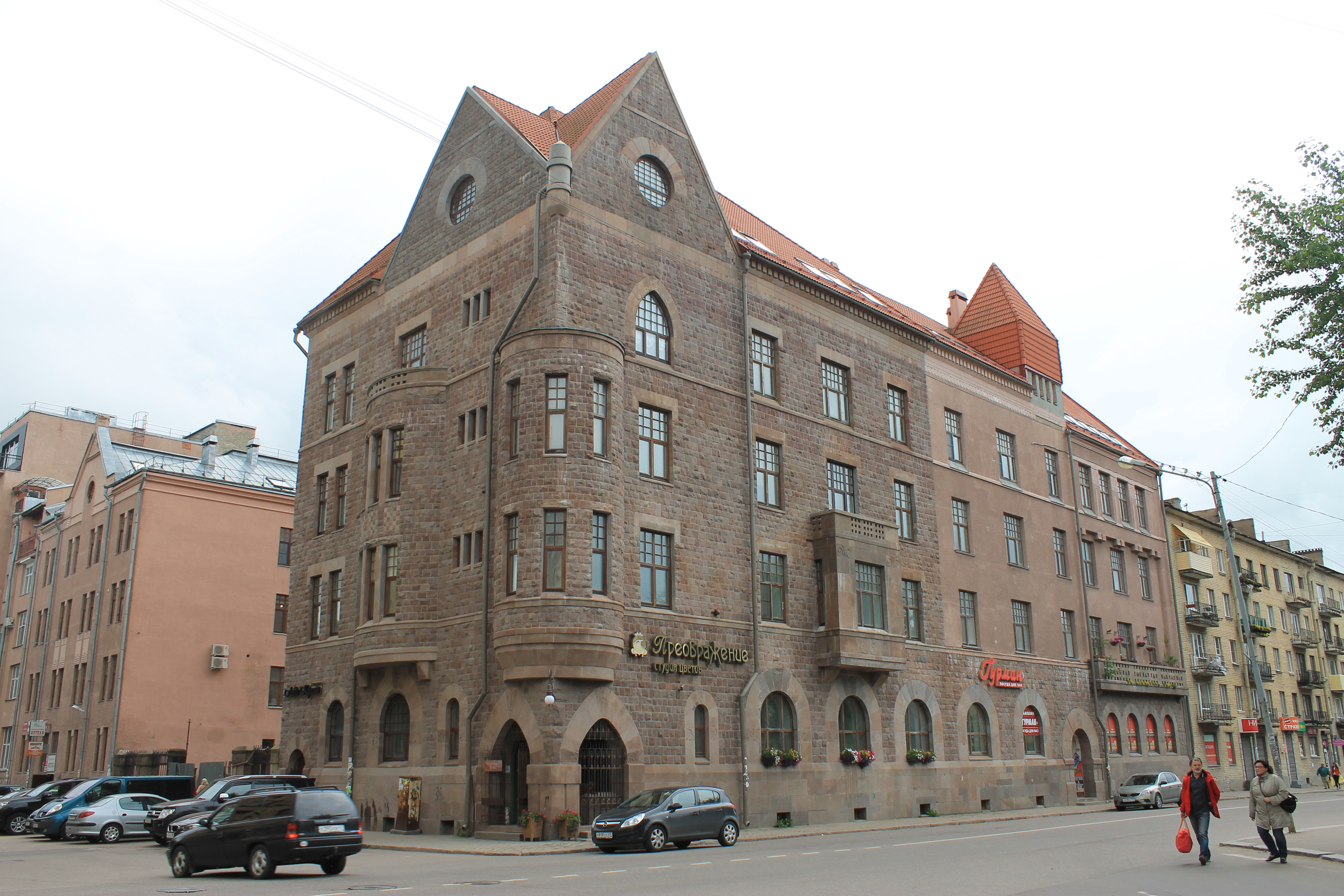 Дом акционерного общества Хякли, Лаллука и К (Санкт-Петербург и Лен.область, Выборг, улица Вокзальная, 7)